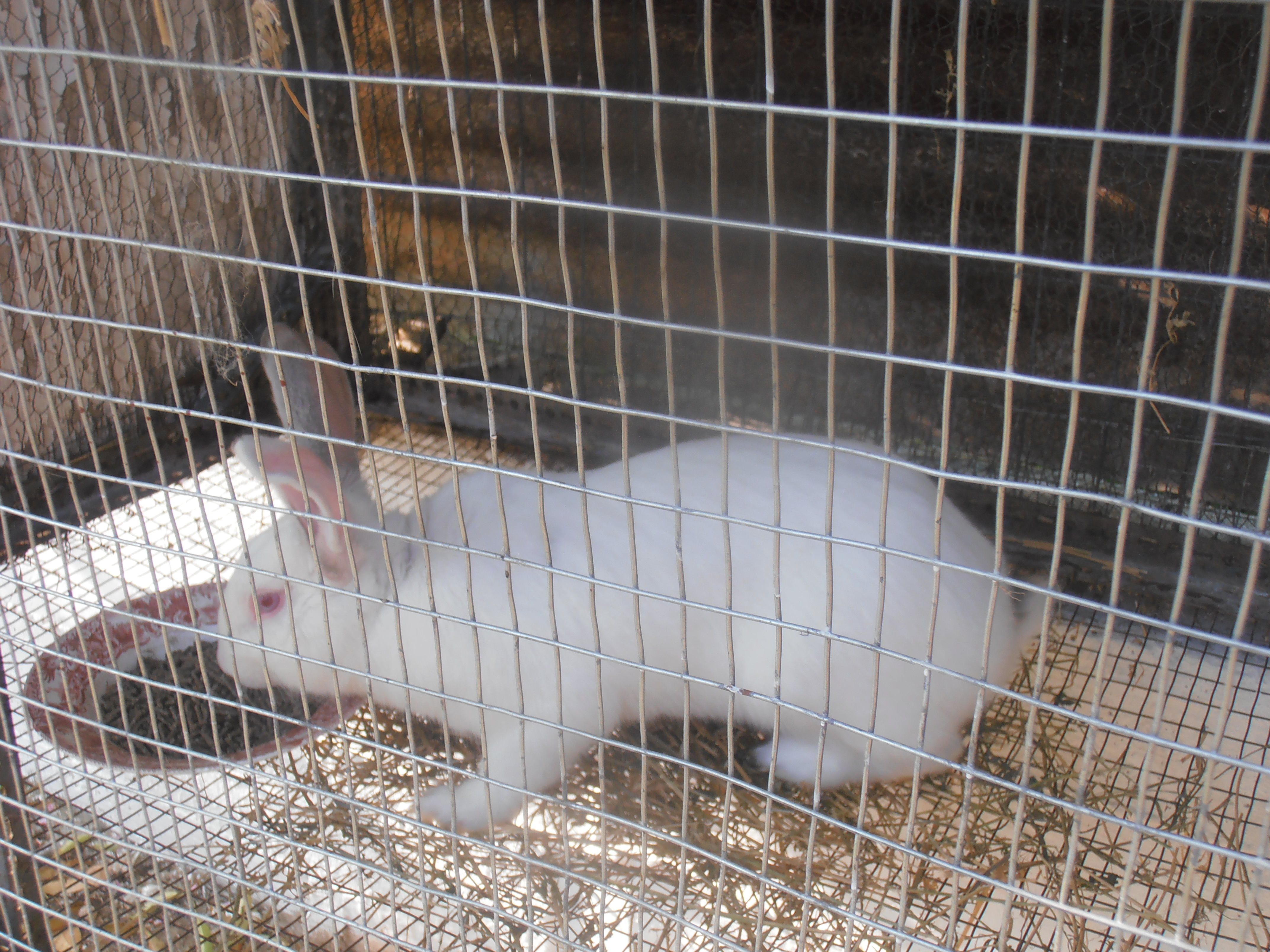 Κουνέλι τρώγοντας.